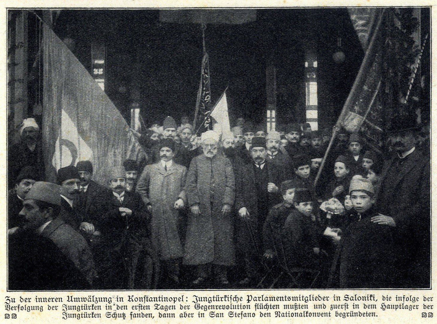 Jungtürkische Parlamentsmitglieder in Saloniki, 1909